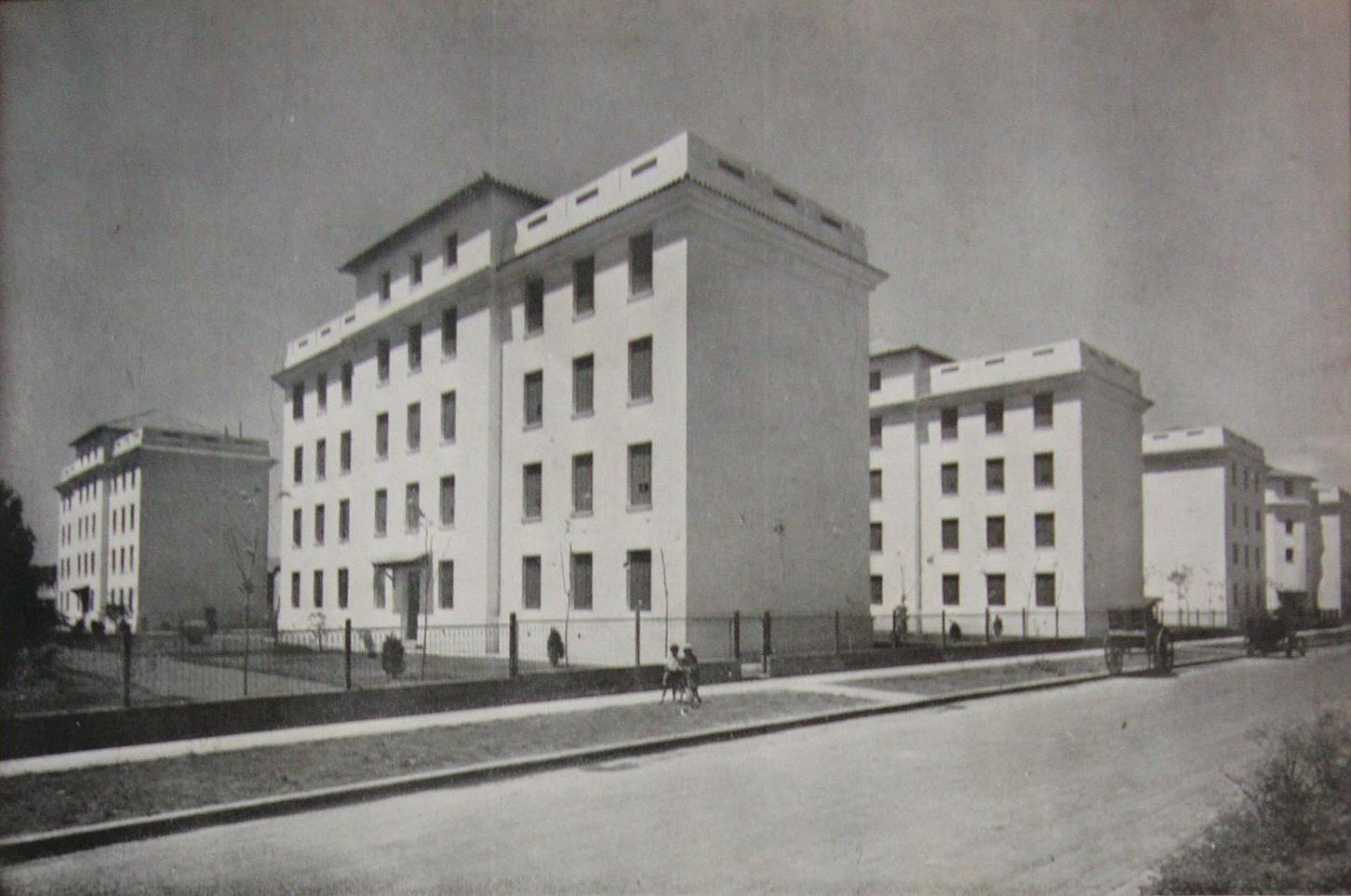 Vista de los edificios de departamentos del Barrio Parque "Guillermo Rawson" construido por la Comisión Nacional de Casas Baratas en el barrio de Agronomía. Ciudad de Buenos Aires, Argentina.